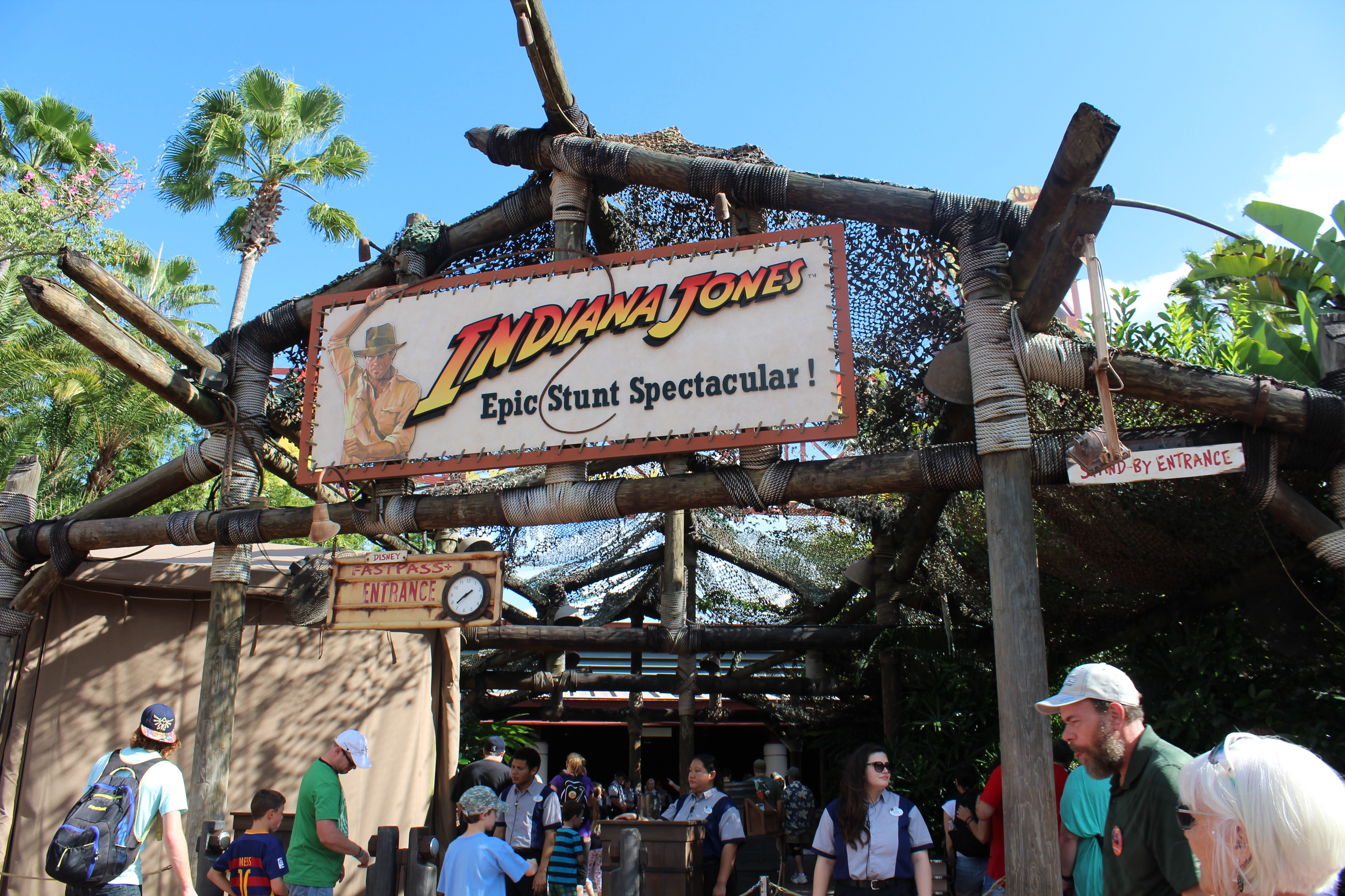 Disney's Hollywood Studios